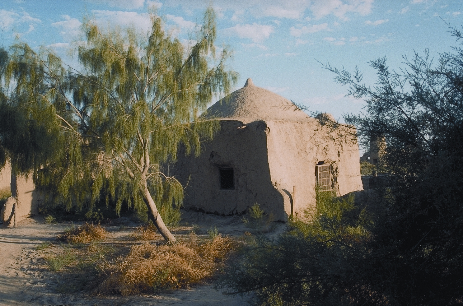 Altes Mausoleum mit Saksaul Baum / Turkmenistan